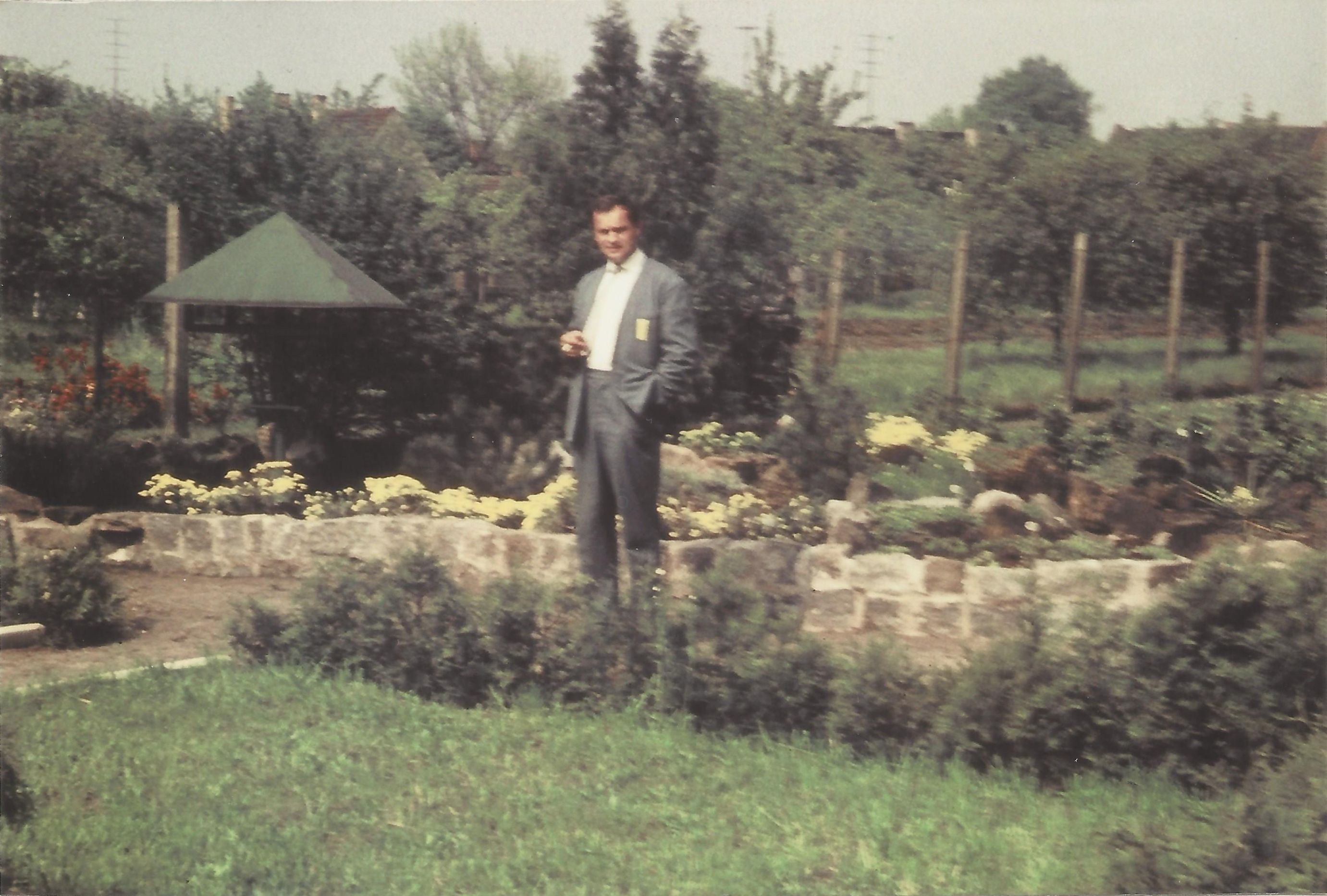 Horst Bormann im Schulgarten Ruhland, Hartwigstraße, vor dem Alpinum 1965